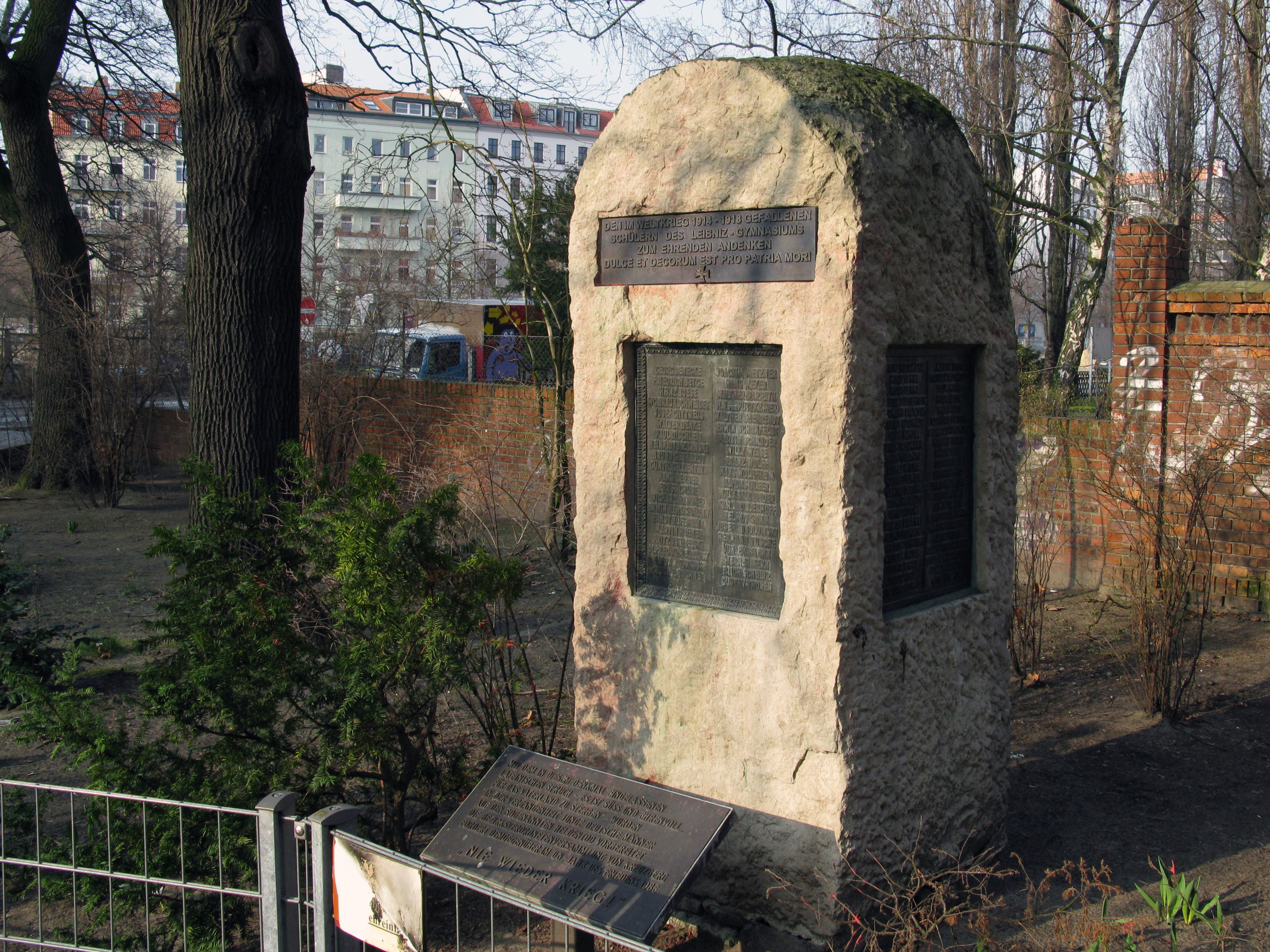 Kriegerdenkmal am Mariannenplatz in Berlin-Kreuzberg